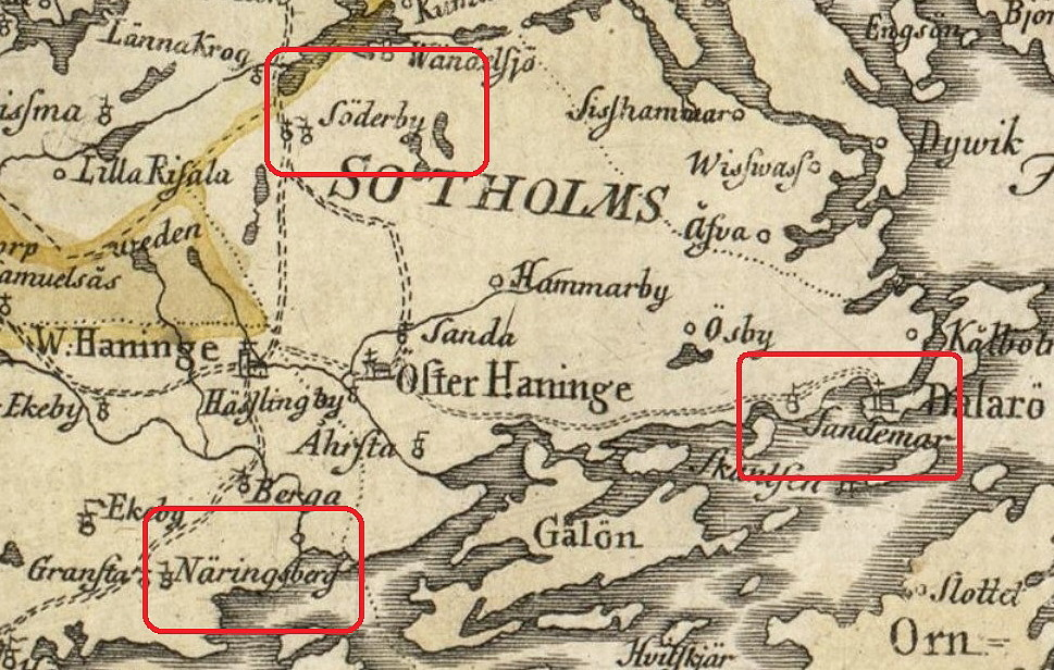 Slott Sandemar på 1772 års vägkarta över Stockholm med omgivningar